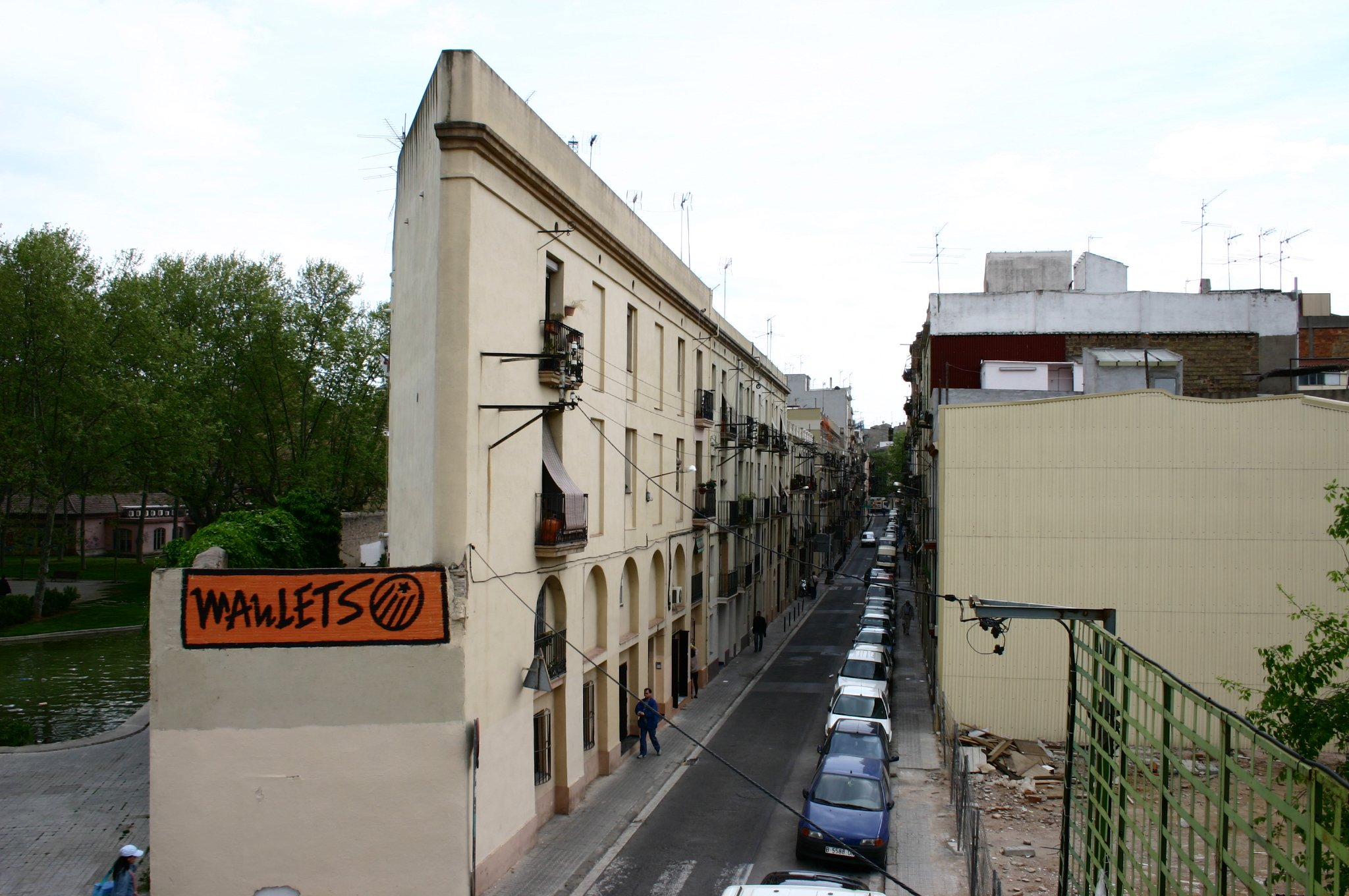 Edificis de Barcelona Sants, es pot veure una pintada dels Maulets